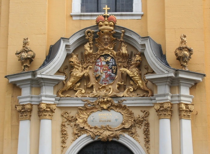 Portal von St. Paulin in Trier; Aufschrift basilica sancti paulini (Basilika des heiligen Paulinus)